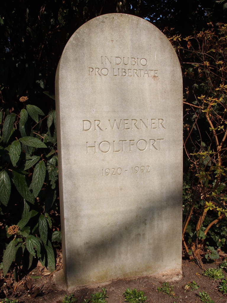 Grab des Juristen und Politikers Werner Holtfort (1920-1992) auf dem Engesohder Friedhof in Hannover.